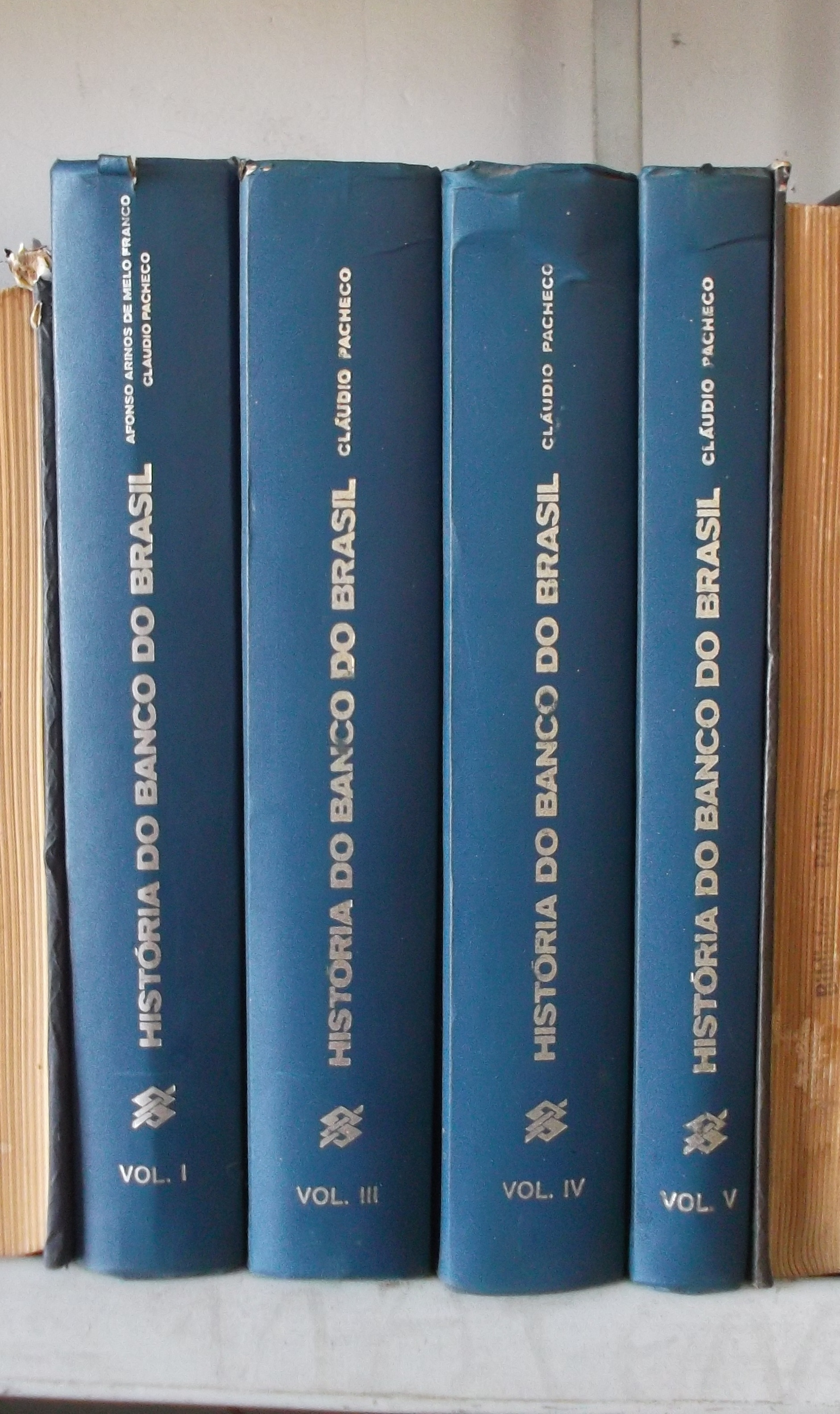 Obra de Afonso Arinos e Cláudio Pacheco Brasil sobre História do Banco do Brasil na Biblioteca Pública de Campo Maior,Piauí.